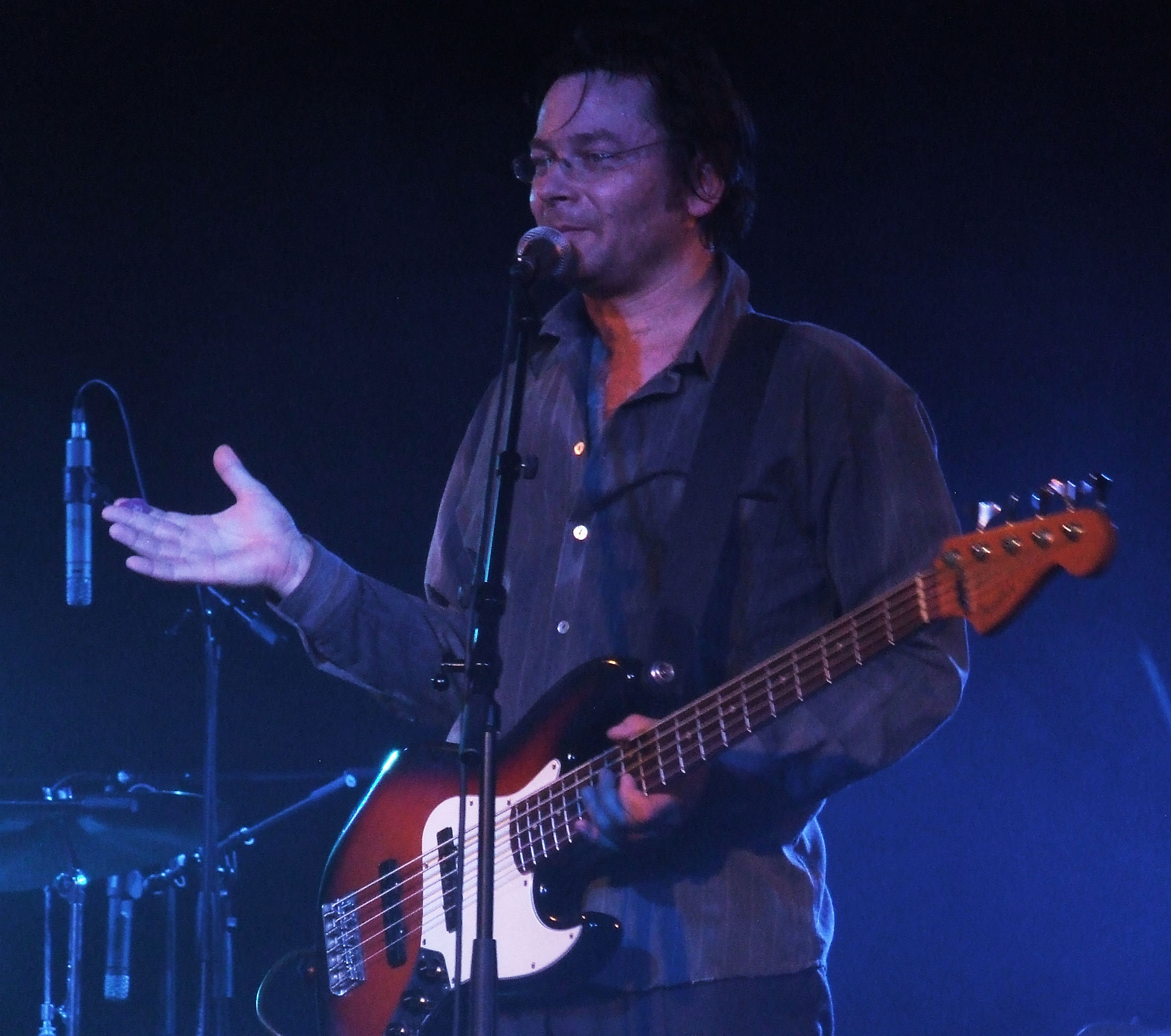 Lovasi András, Szeged, Ifjúsági Ház